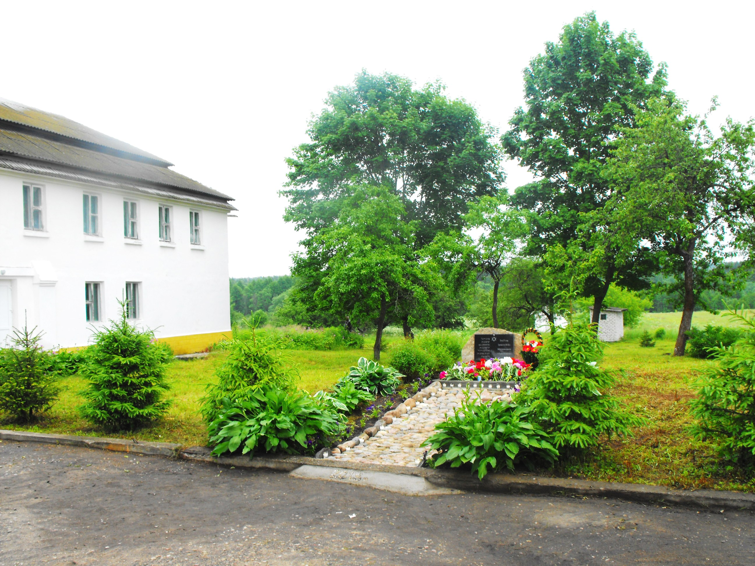 Памятник убитым нацистами евреям деревни Городок Молодечненского района Минской области на месте бывшего гетто. Открыт 20 июня 2015 года.